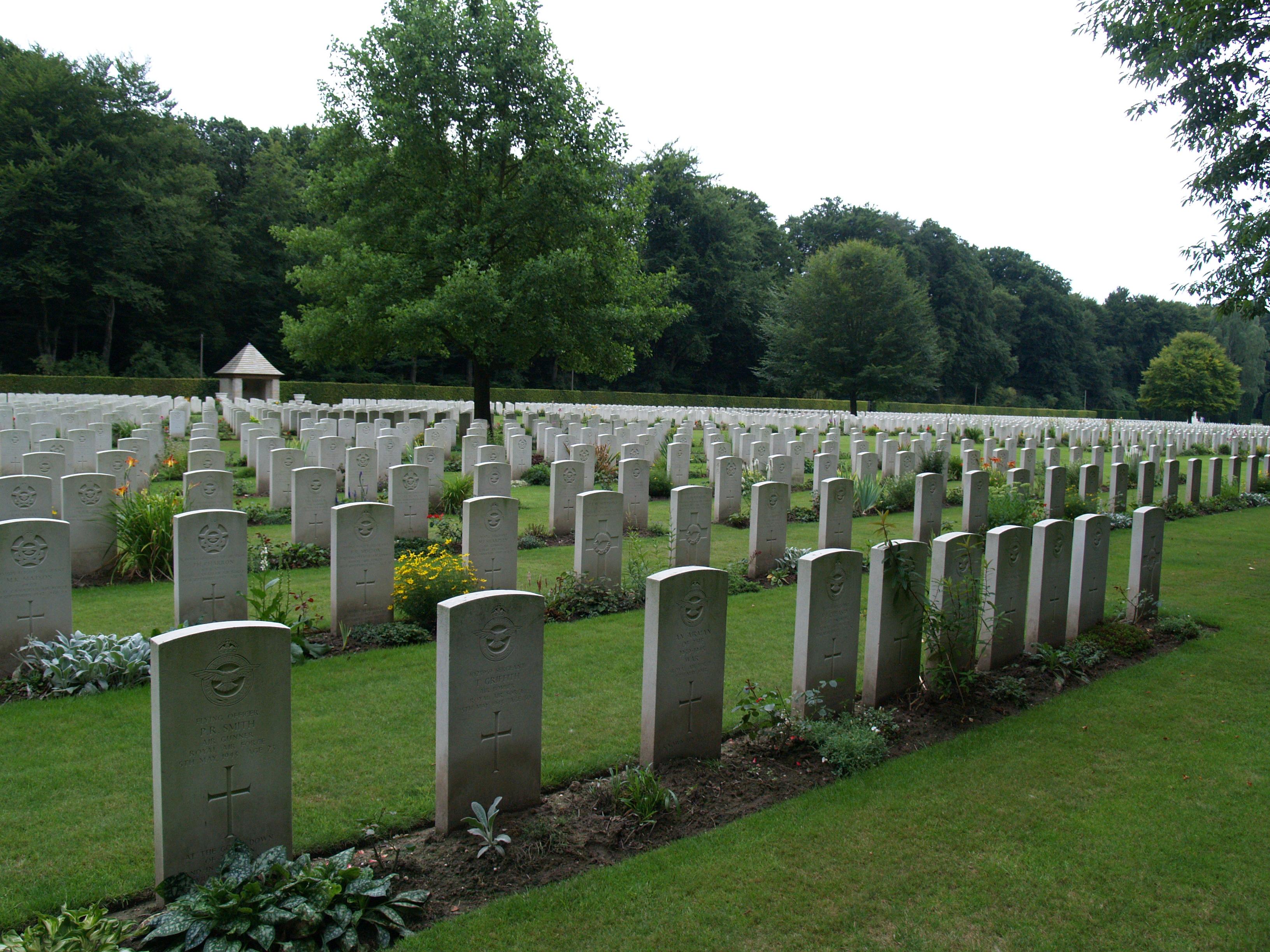 Reichswald Forest War Cemetery